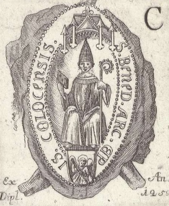 Benedek kalocsai érsek pecsétje 1252-ben, a rajz Knauz Nándor munkája